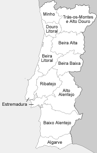 Antigas Províncias de Portugal